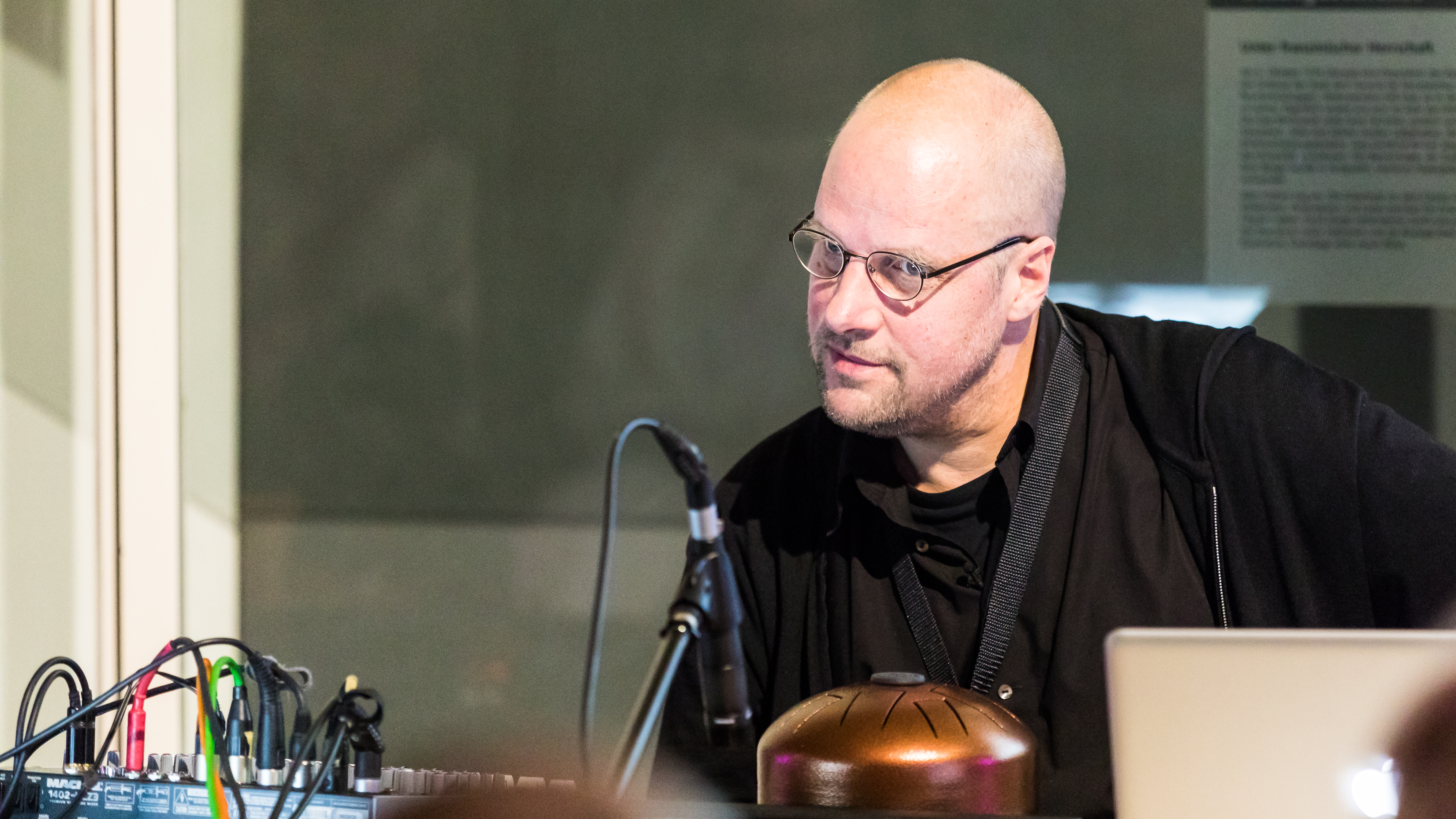 Ein Abend mit der „Mutter“ der Fluxus-Bewegung Mary Bauermeister. Im Rahmen der Sonderausstellung „KÖLN 68! Protest. Pop. Provokation.“ traten Mary Bauermeister und ihr Sohn Simon Stockhausen gemeinsam auf die Bühne. Mit dabei auch der Künstler Gregor Zootzky mit seinem Zeichentrick-Kurzfilm „Psst pp Piano – Hommage à Mary Bauermeister“. Foto: Simon Stockhausen